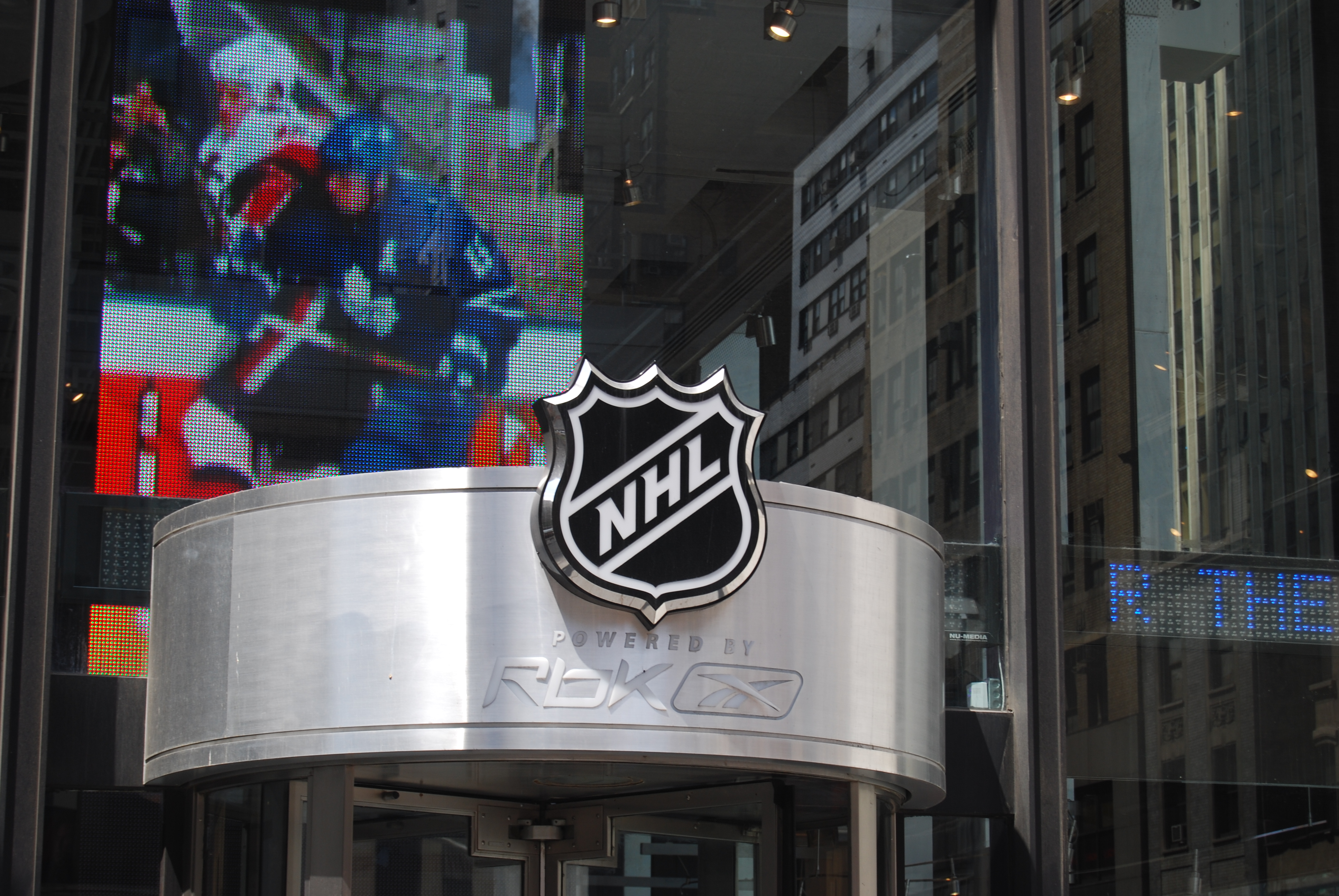 NHL STORE